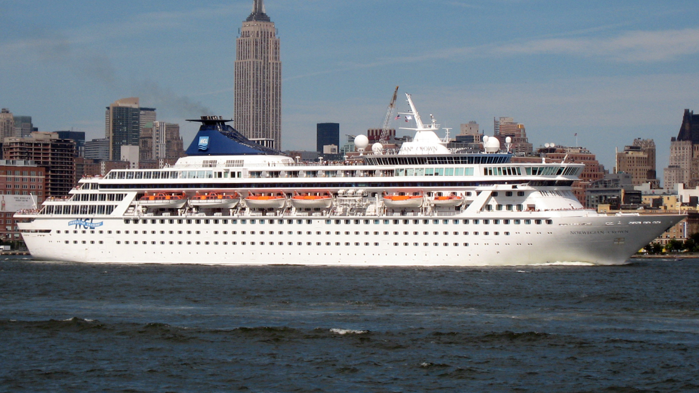 From Hoboken.